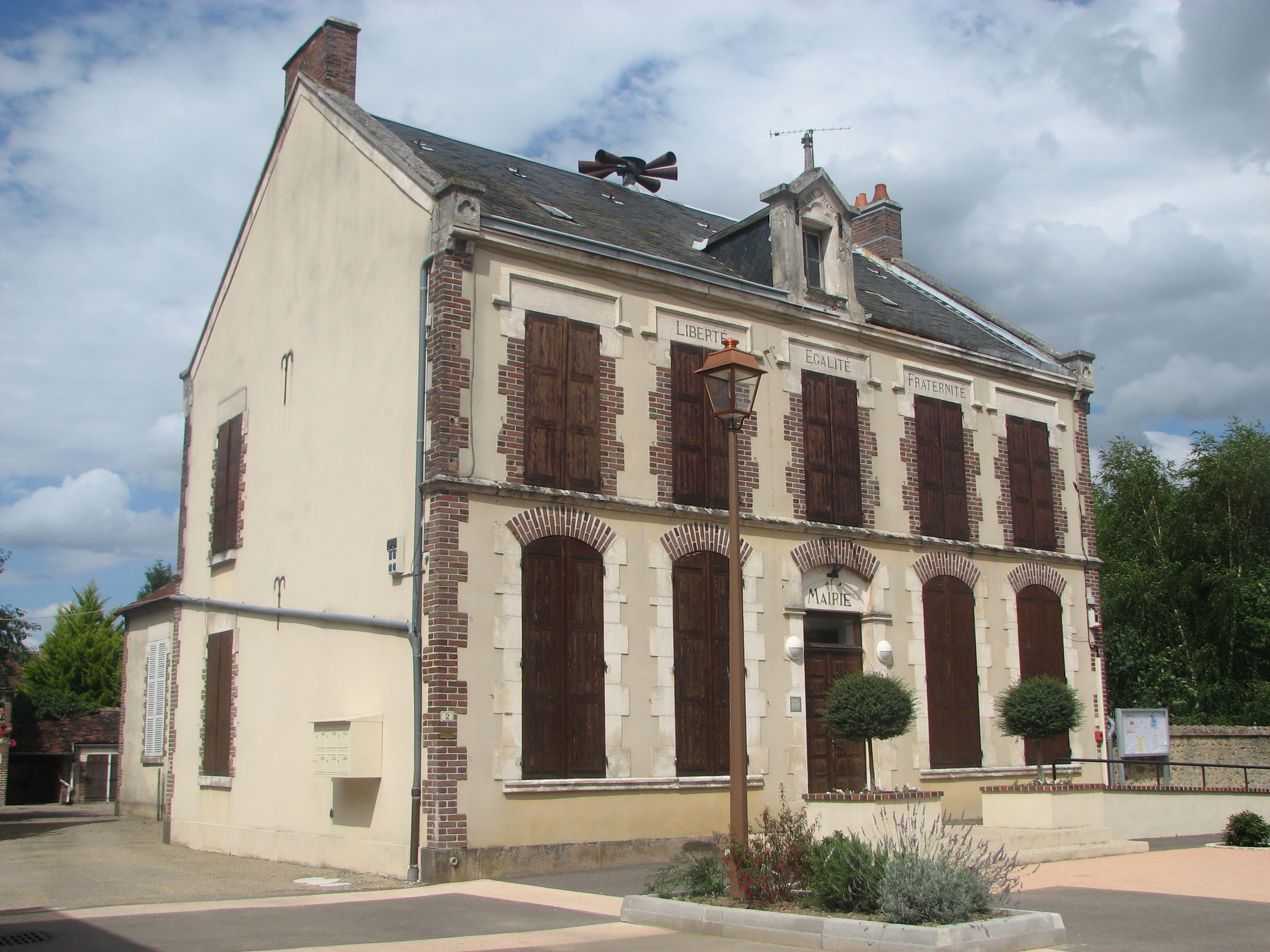 Mairie de Dracy (Yonne)